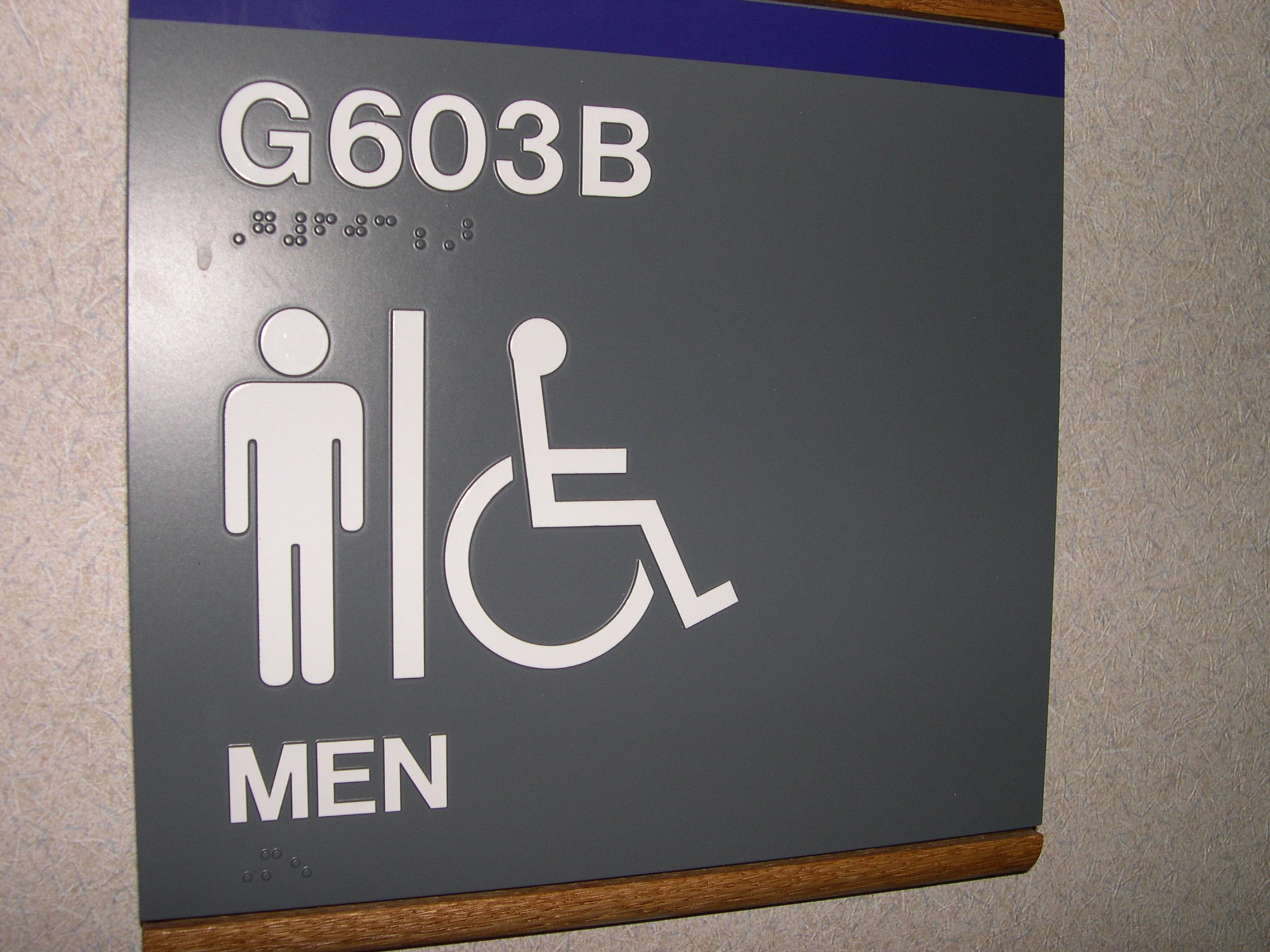 Accessible sign to accessible bathroom at Chicago